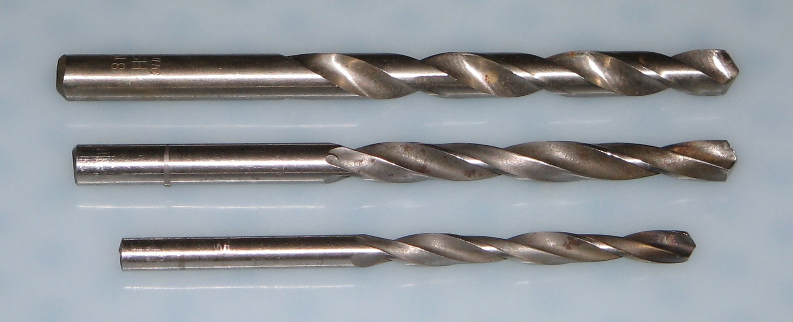 Trepanoj por metalo de diametroj 5.5, 7, kaj 8 mm La foto estis farita de mi mem.